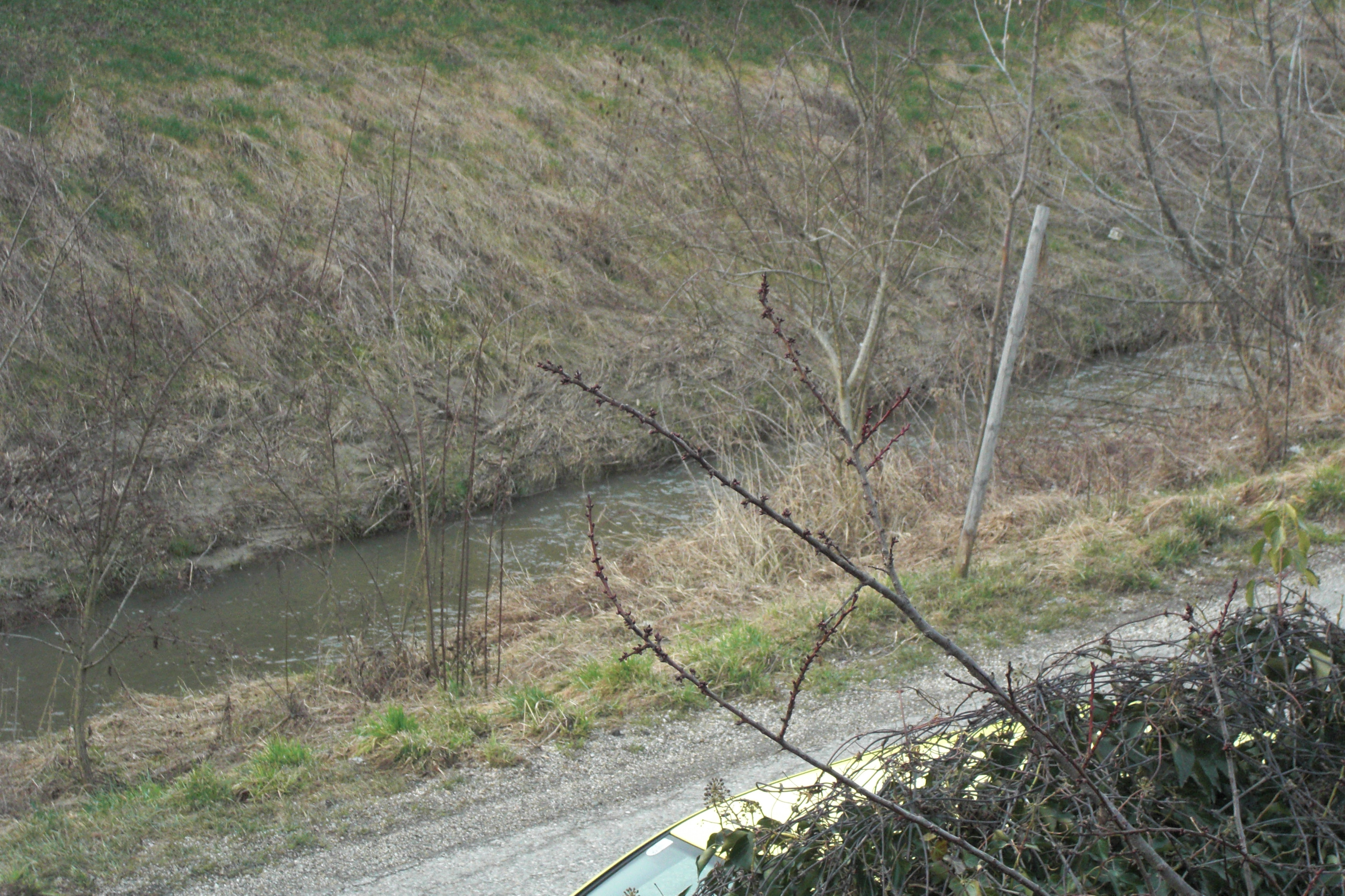 Der Göllersbach in der Bachgasse in Sierndorf